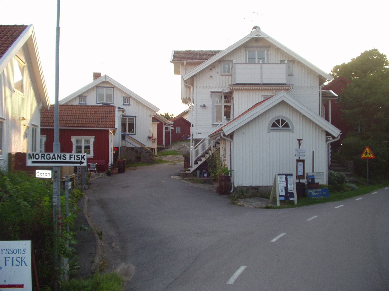 Beskrivning: Mollösund Juli 2005 Fotograf: Kristian Persson (jag själv)